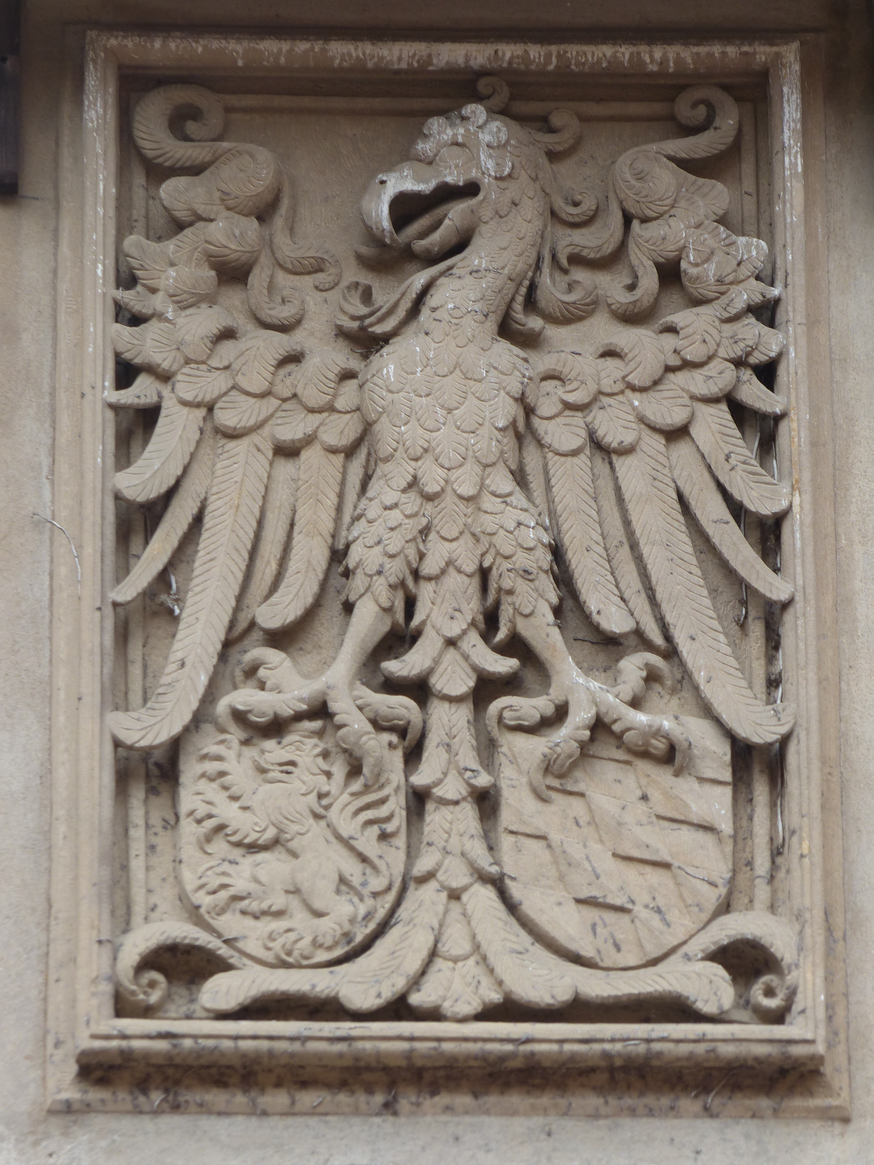 Heidelberger Schloss Ruprechtsbau, Wappen von König Ruprecht I, mit Reichsadler, pfälzischem Löwen und Wittelsbacher Rauten